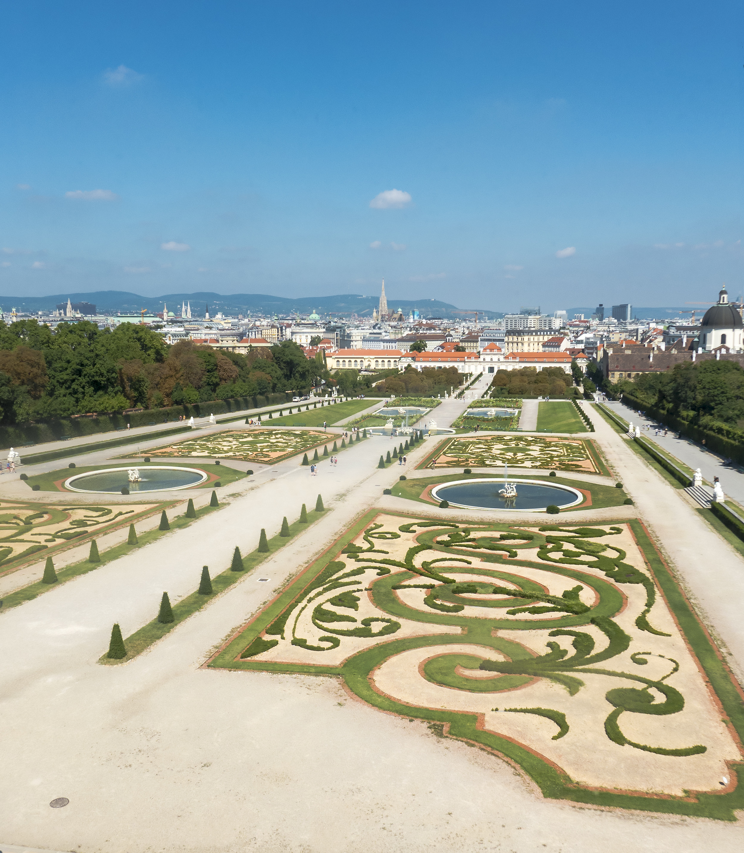 Belvederegarten in Wien 3